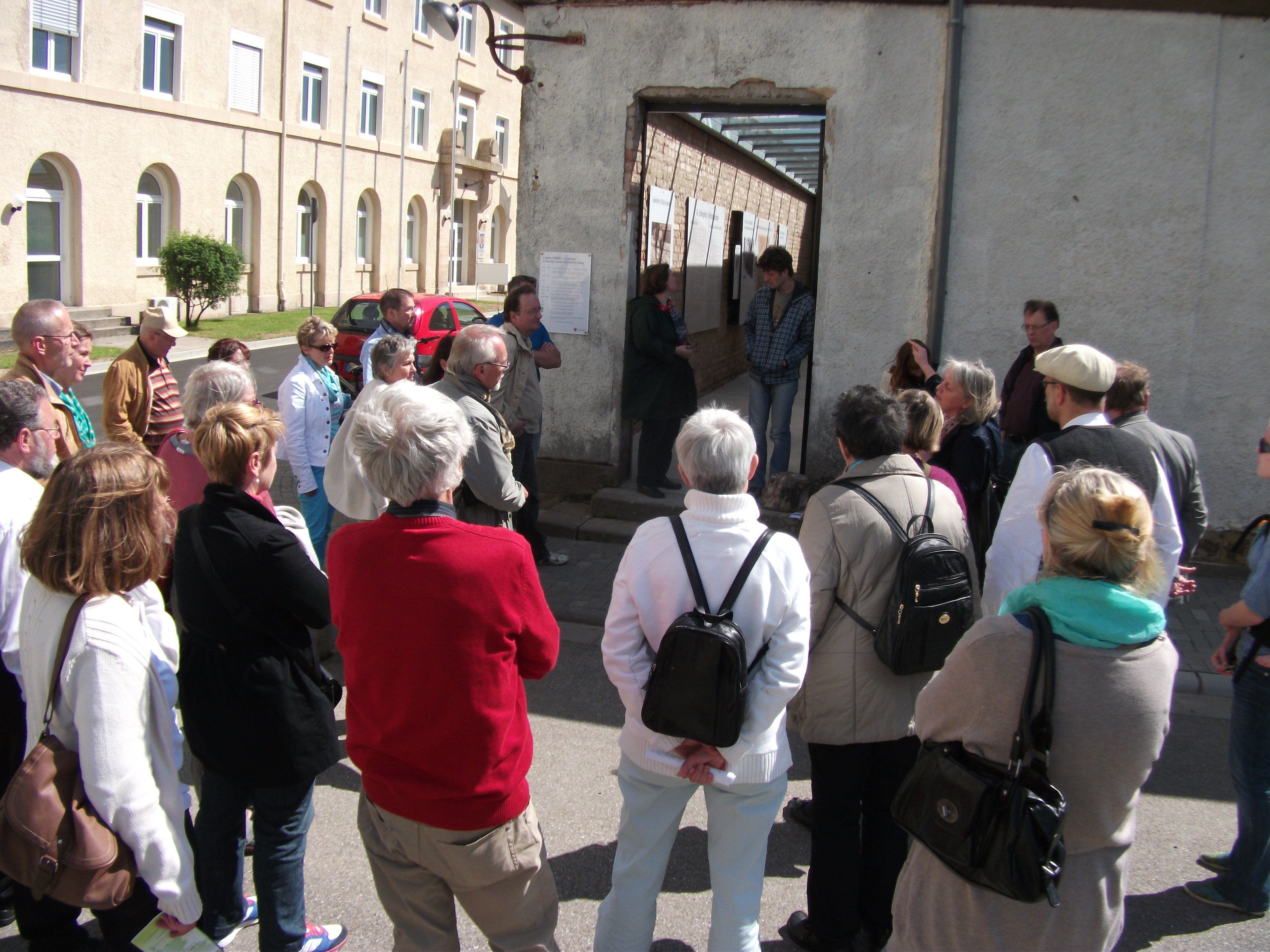 Besucherfuehrung in der Gedenkstaette fuer NS-Opfer in Neustadt (ehemalige Turenne-Kaserne)